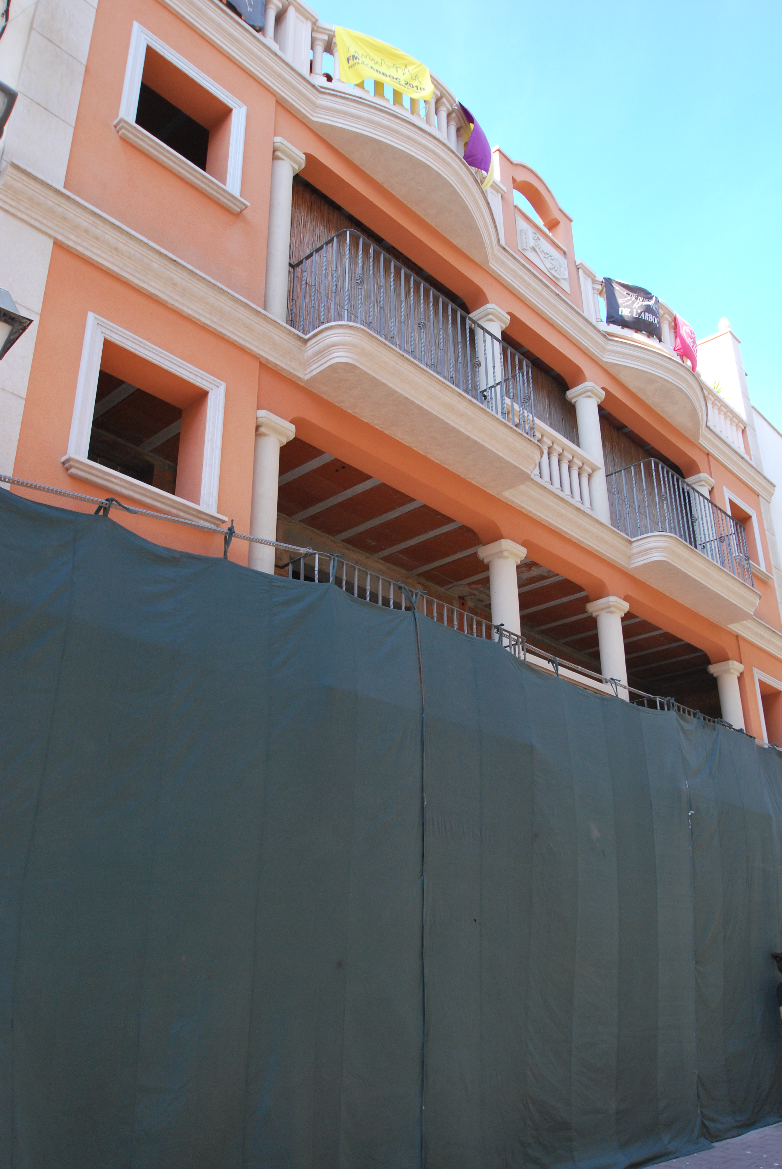 Casa Ayxalà (l'Arboç)